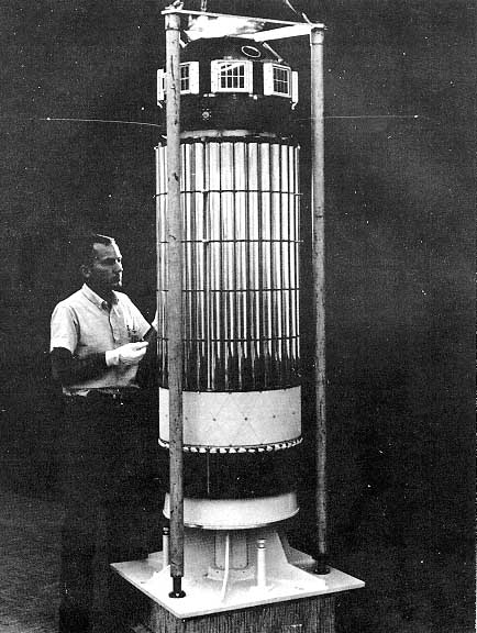 Explorer-13 (S-55a) satellite